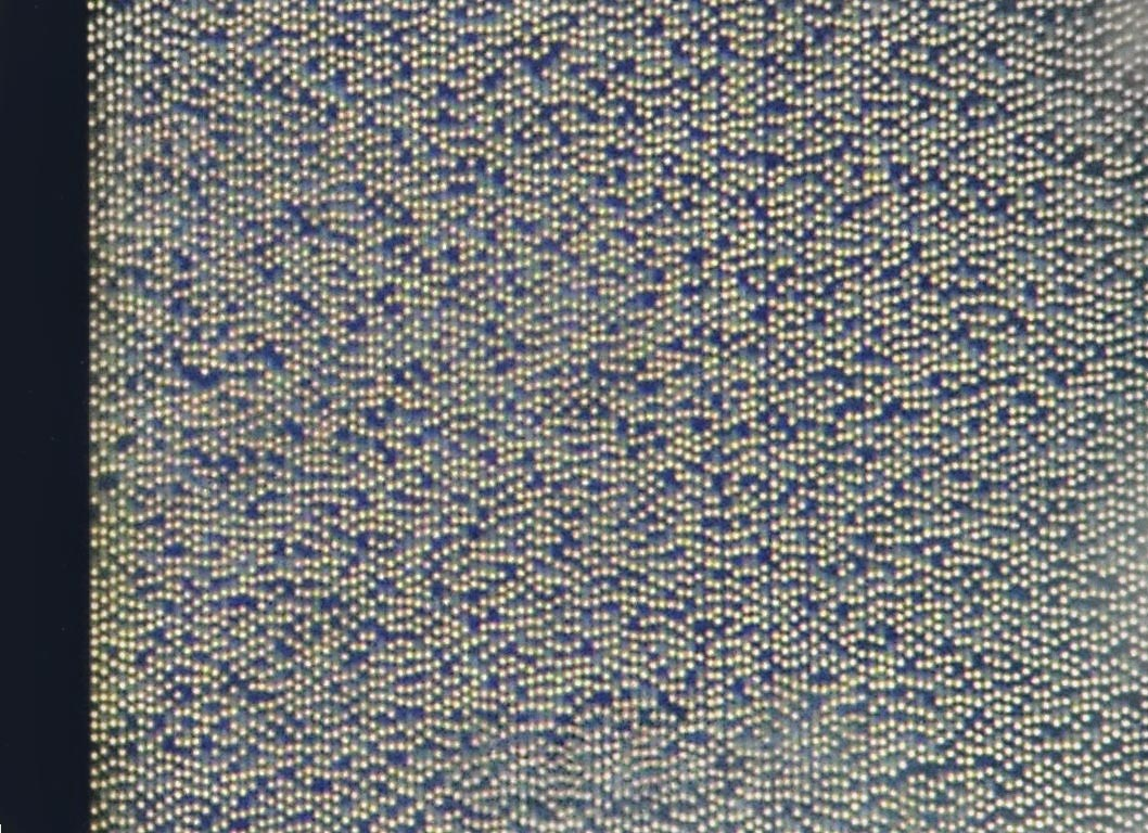 CD Innenrand bei ca. 1000 fach, Auflicht. Bildausschnitt ca. 180µm*140µm. Die Beleuchtung ist streifend. Die Lichtpunkte sind die angestrahlten Kanten der Pits. Die Pits sind die hellen Schatten über den Lichtpunkten. (gepresste CD)